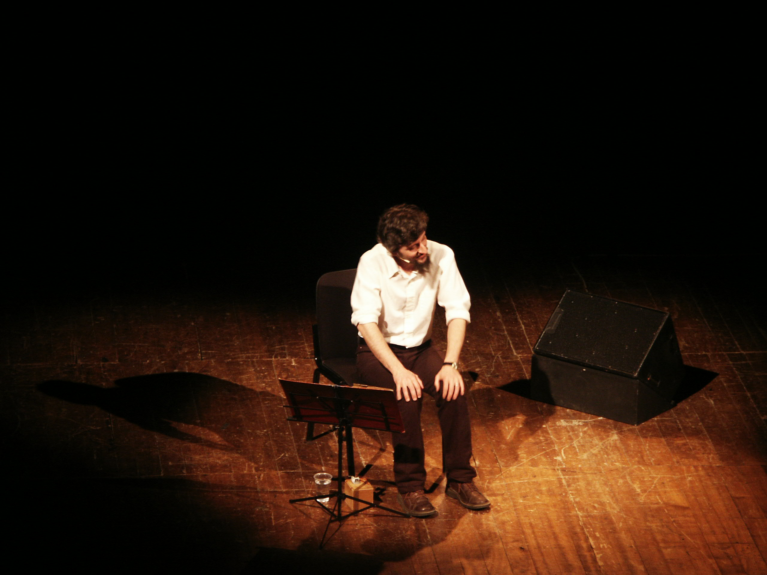 Ascanio Celestini durante la rappresentazione di "Appunti per un film sulla lotta di classe" - Teatro della Corte (Genova)